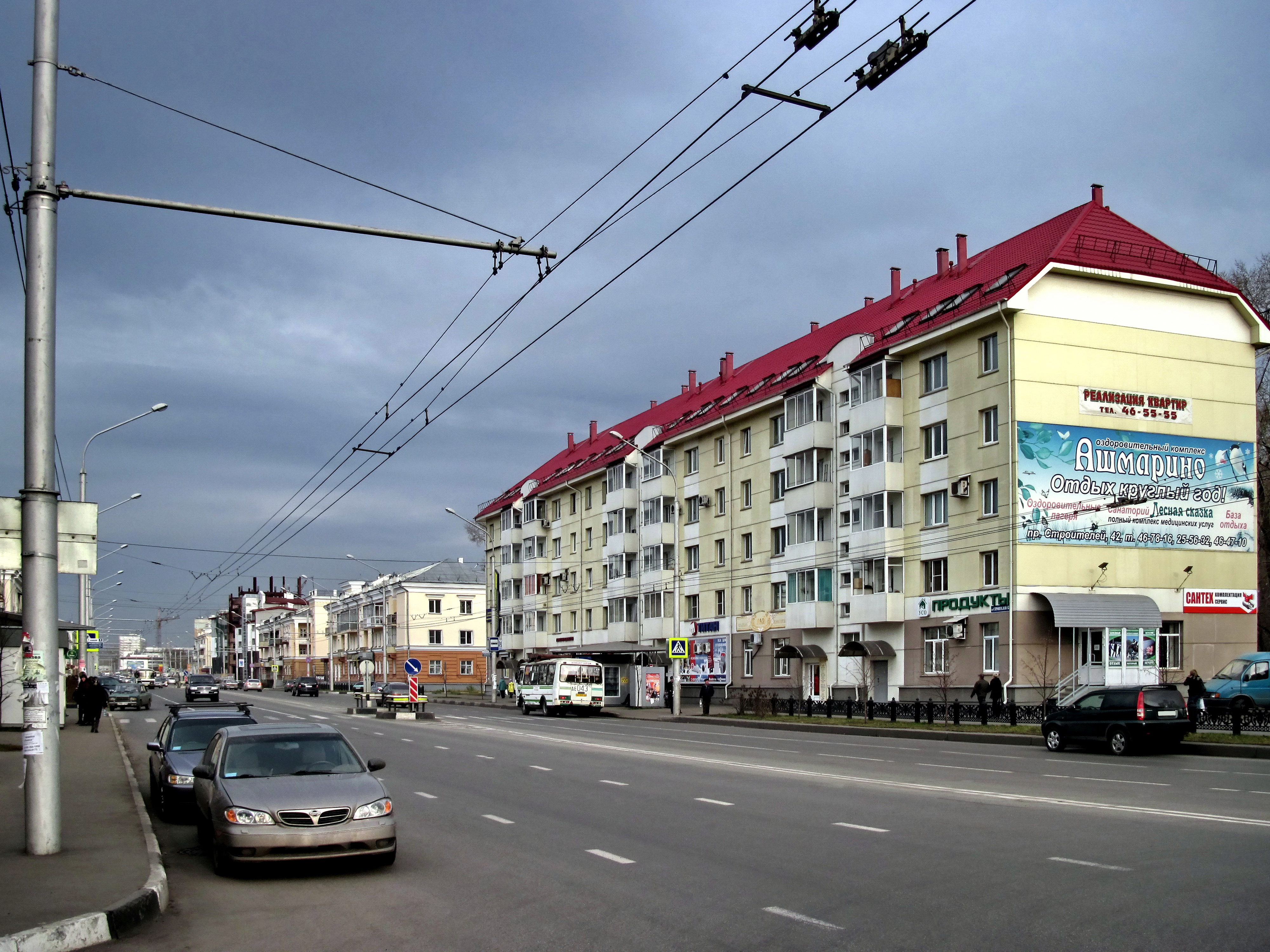 Пр. Строителей